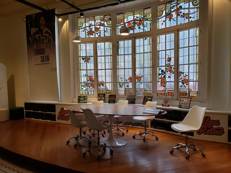 Espaço literário da Sala de Troféus do Fluminense Football Club.